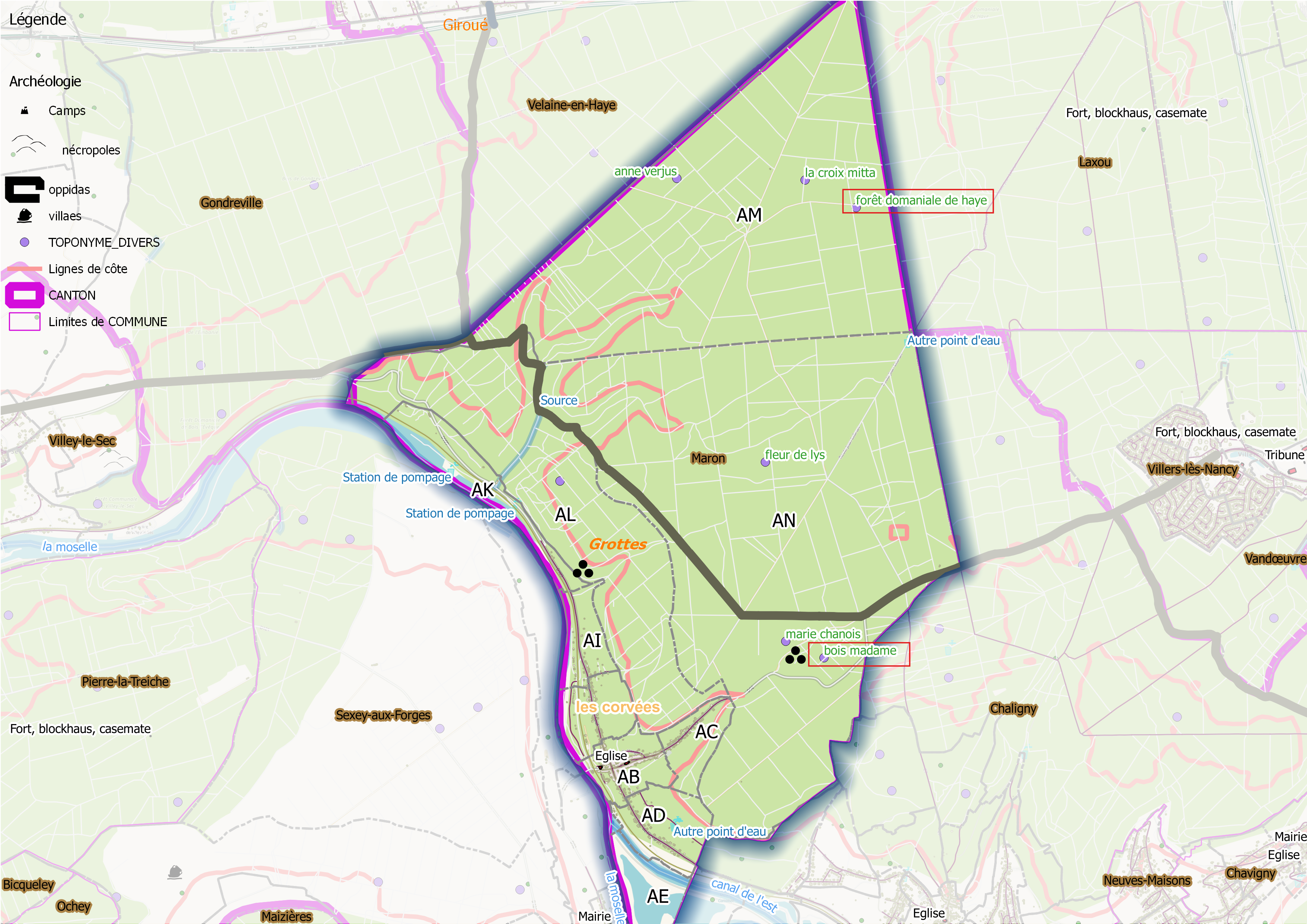 Maron (ban communal) OSM et Qgis, mentions additionnelles